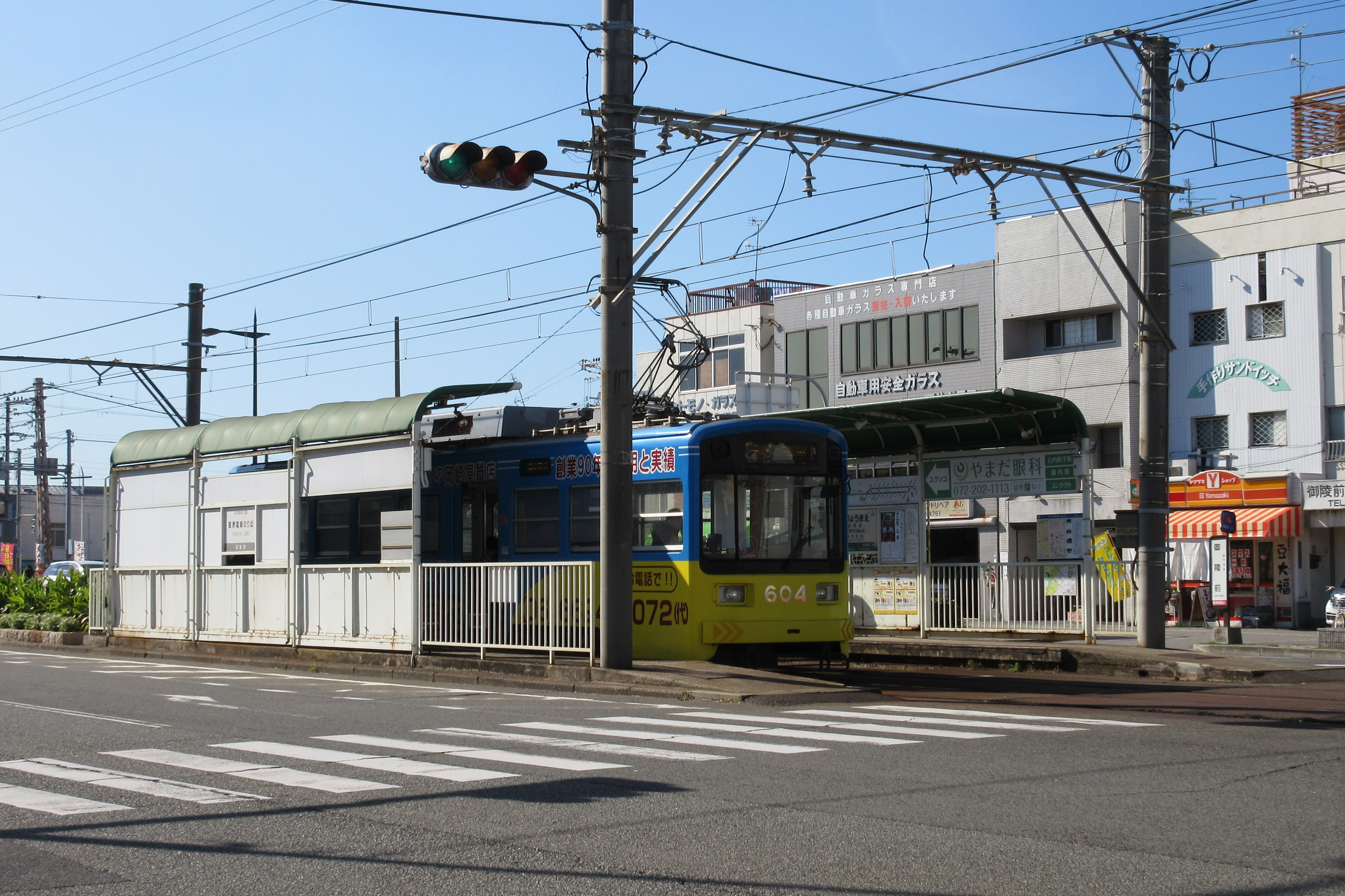 阪堺電車御陵前停留場